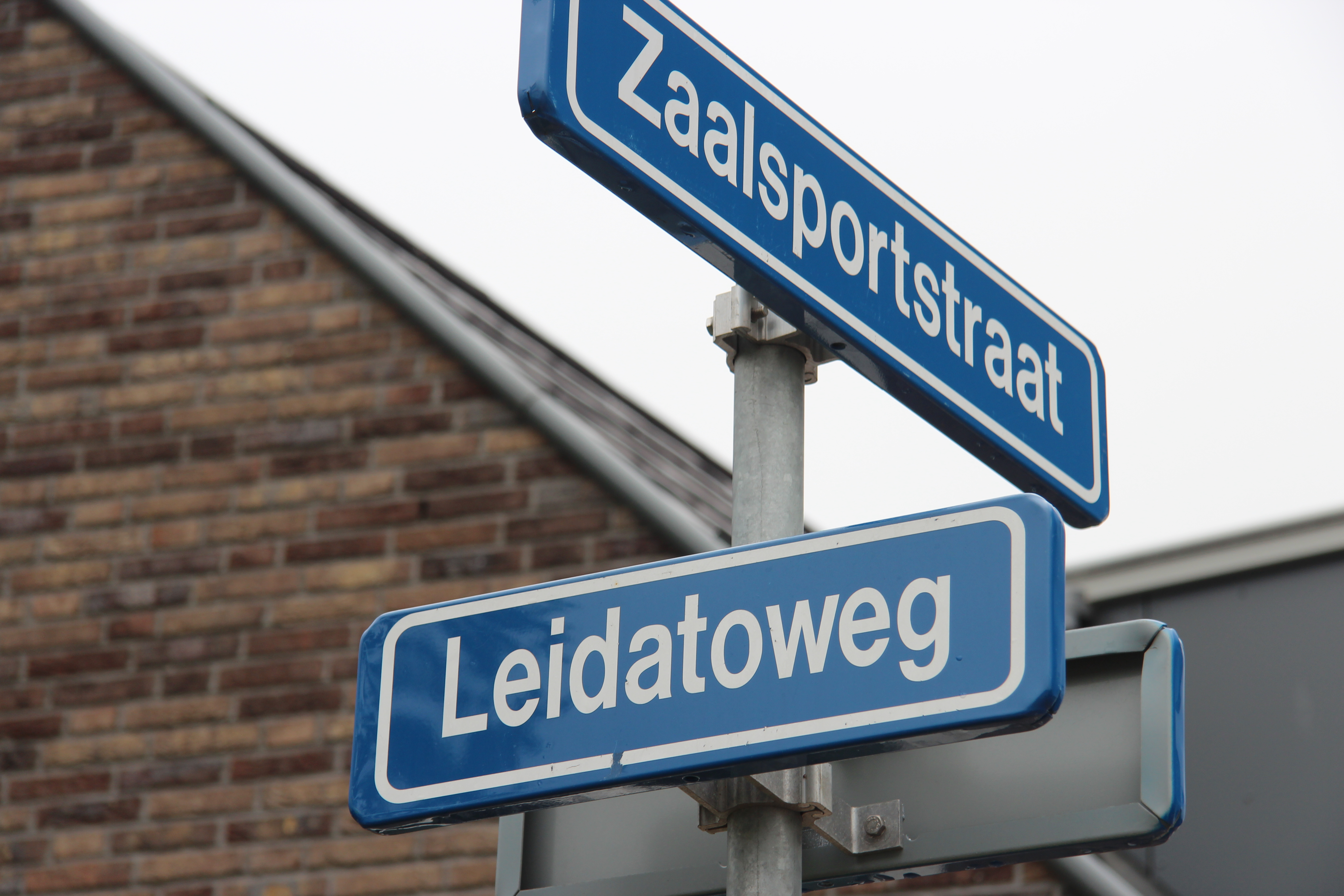 Straatnaambordje Leidatoweg in Leiden. Ter herinnering aan de gelijknamige Huishoudbeurs in de voormalige Groenoordhallen.